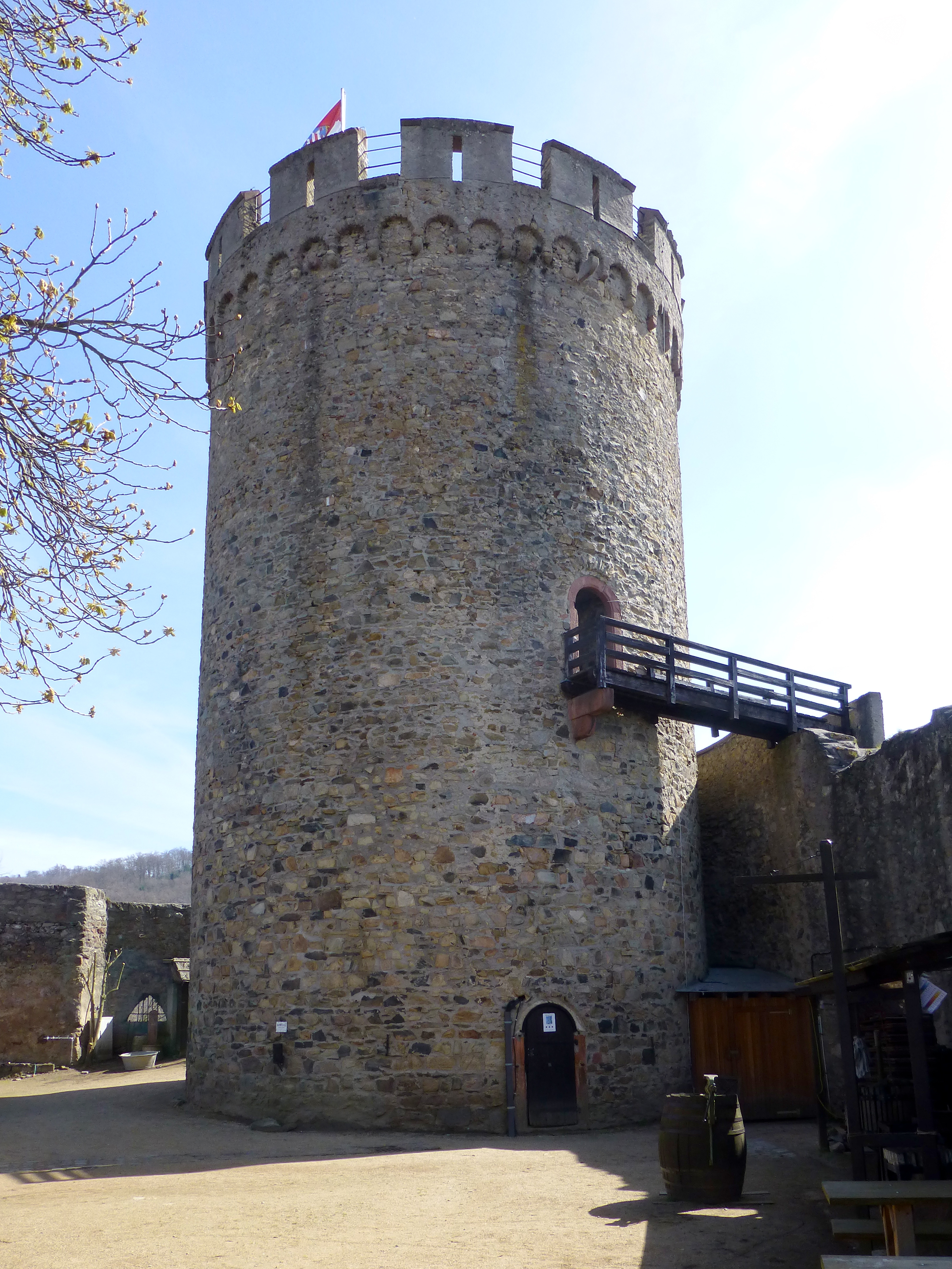 Bergfried des Alsbacher Schlosses; Ansicht von Nordwesten mit Blick auf den Hocheingang und die Holzbrücke am Zugang; unten die Tür zum Verlies